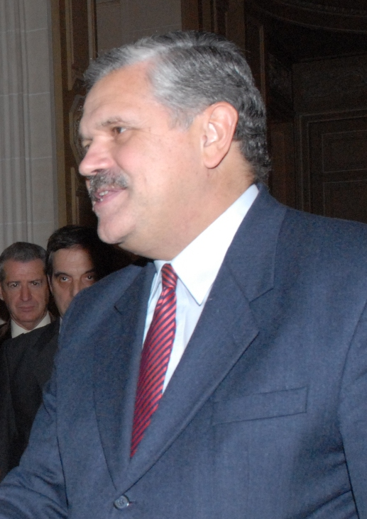 El Sr. Kelly saluda a Ricardo Lopez Murphy